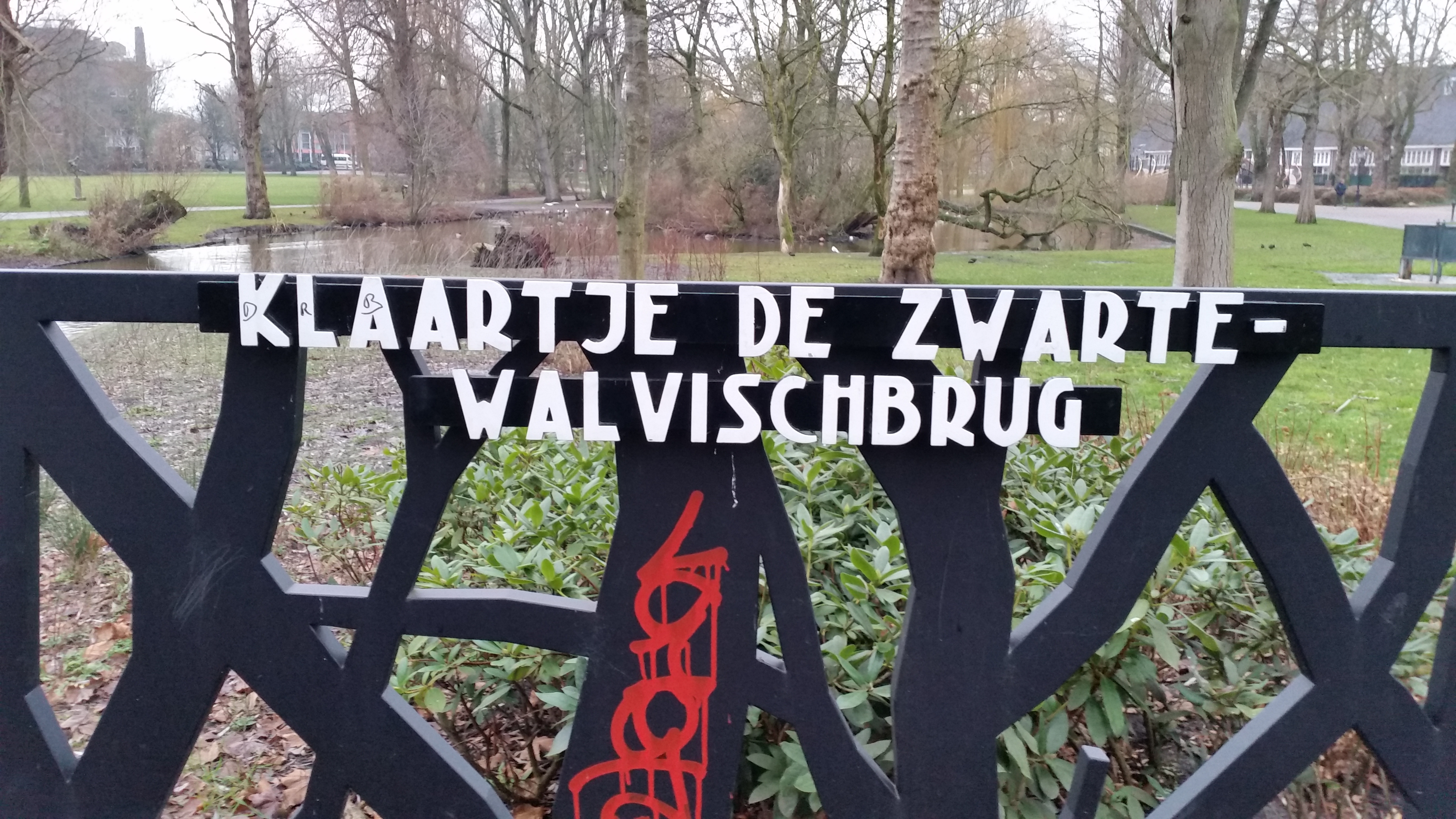 Klaarte de Zwarte-Walvischbrug (brug 1925) in het Oosterpark in Amsterdam-Oost in december 2019